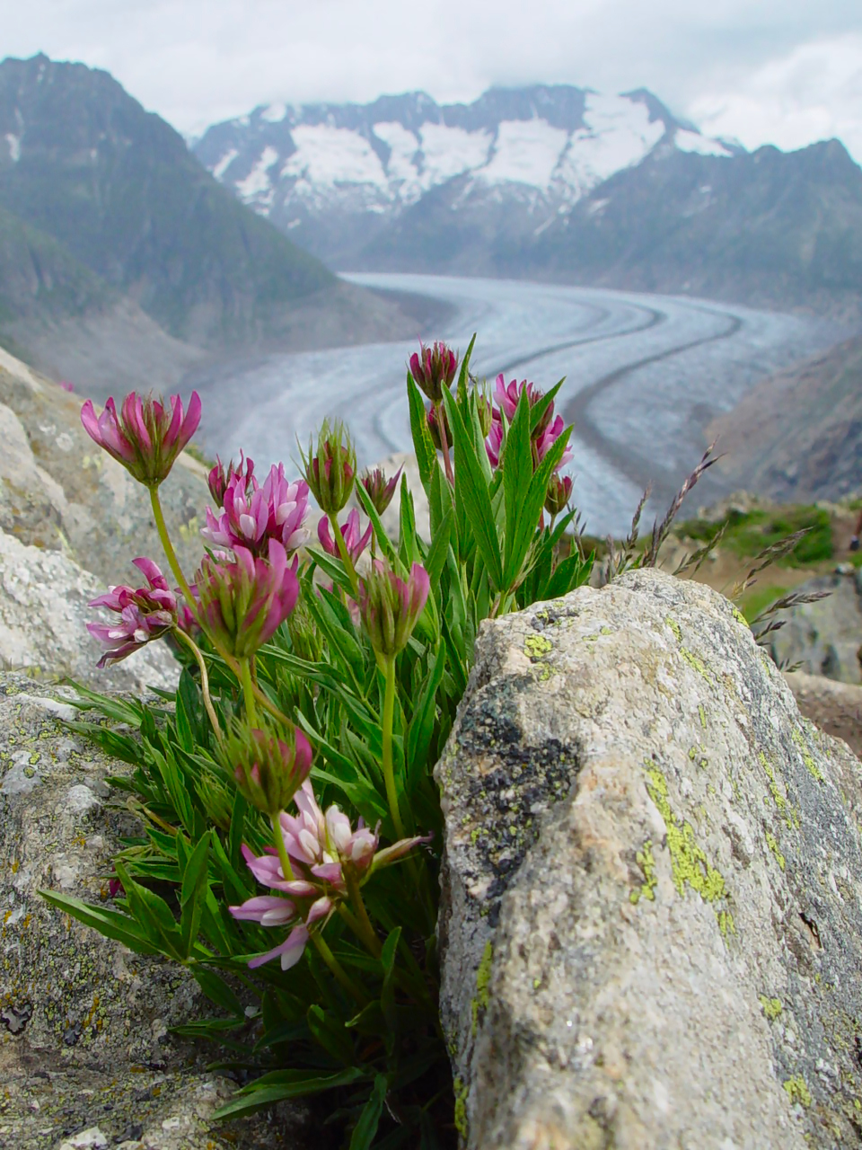 Fleurs (Trèfle alpin) avec le Glacier d'Aletsch en arrière plan